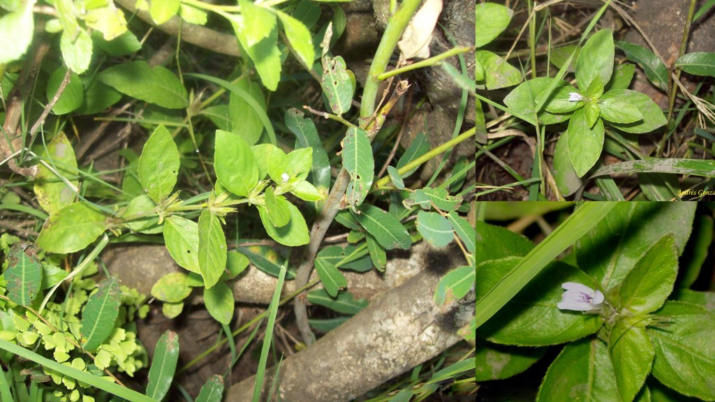 Hygrophila costata. Acanthaceae. Fotos tomadas al margen del Arroyo Guaviyú en Cerro Chato, departamento de Paysandú, Uruguay.